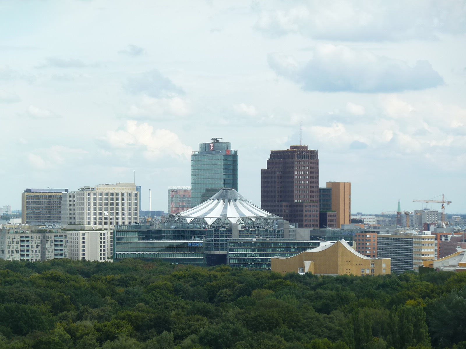 Sony Center von der Siegessäule aus fotografiert. Im Hintergrund rechts ist der Kollhoff-Tower zu sehen, links daneben der Bahntower. Im Vordergrund kann man die Berliner Philharmonie sehen.